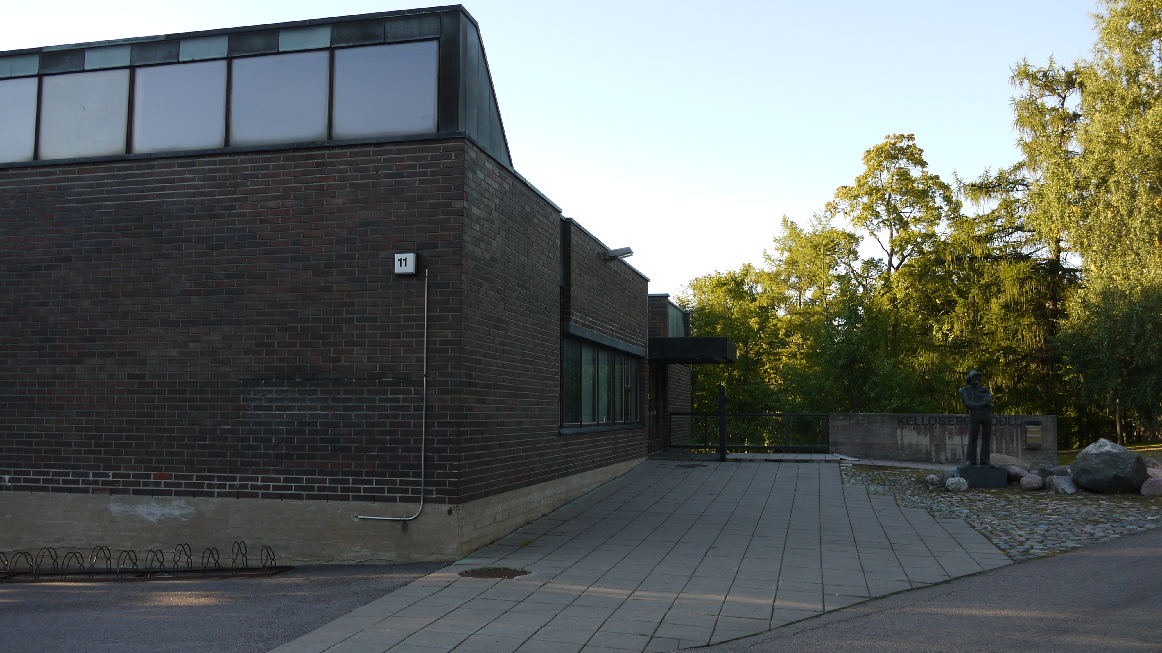 Kelloseppäkoulu Espoon Leppävaarassa